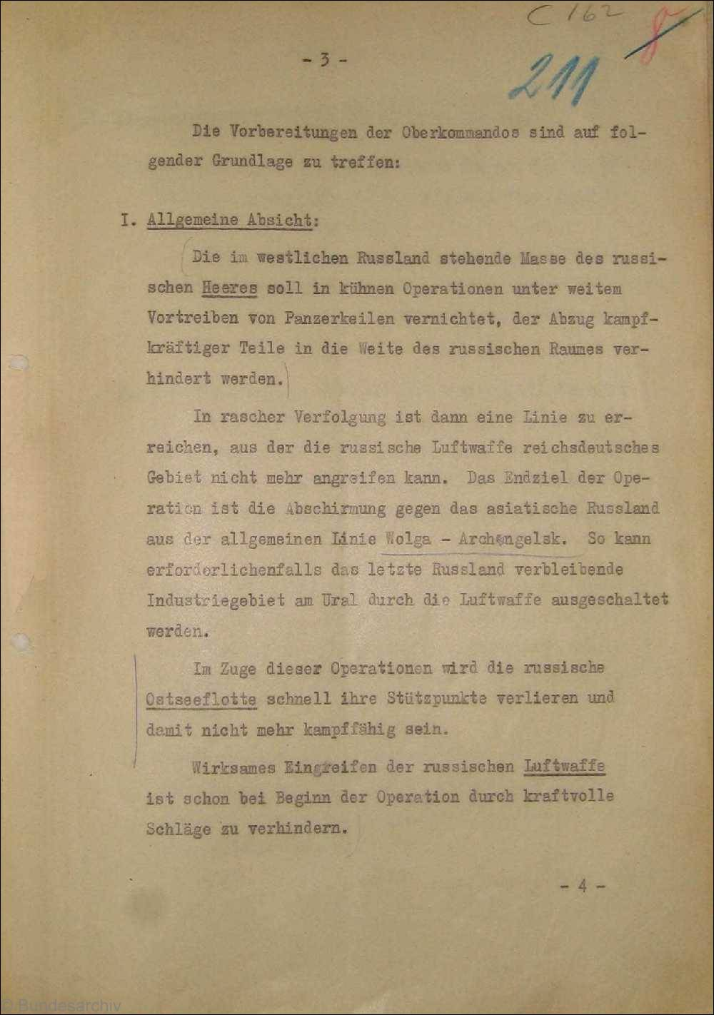 Fall Barbarossa Weisung 21